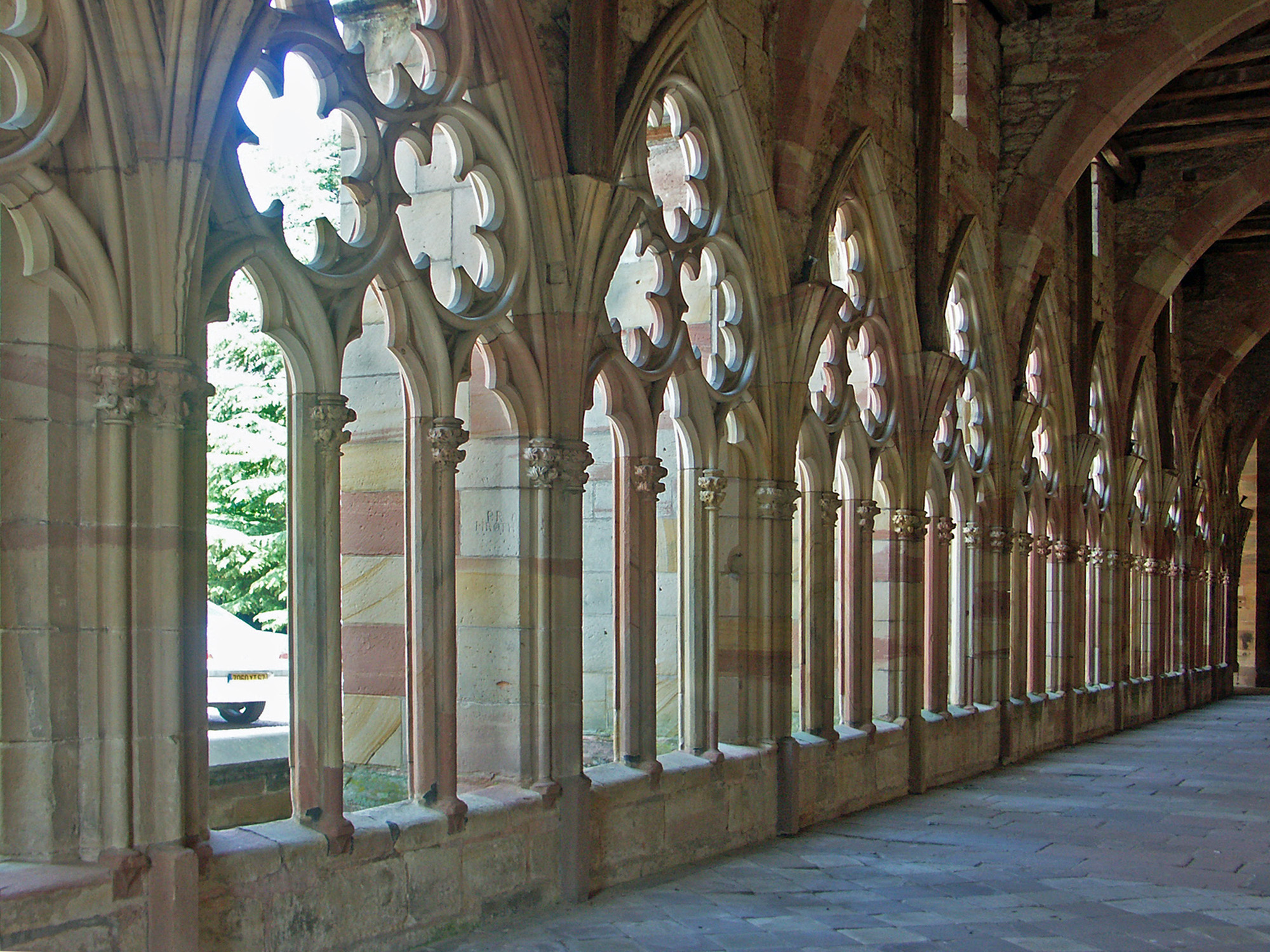 Gotischer Kreuzgang des alten Klosters Weißenburg im Elsass.